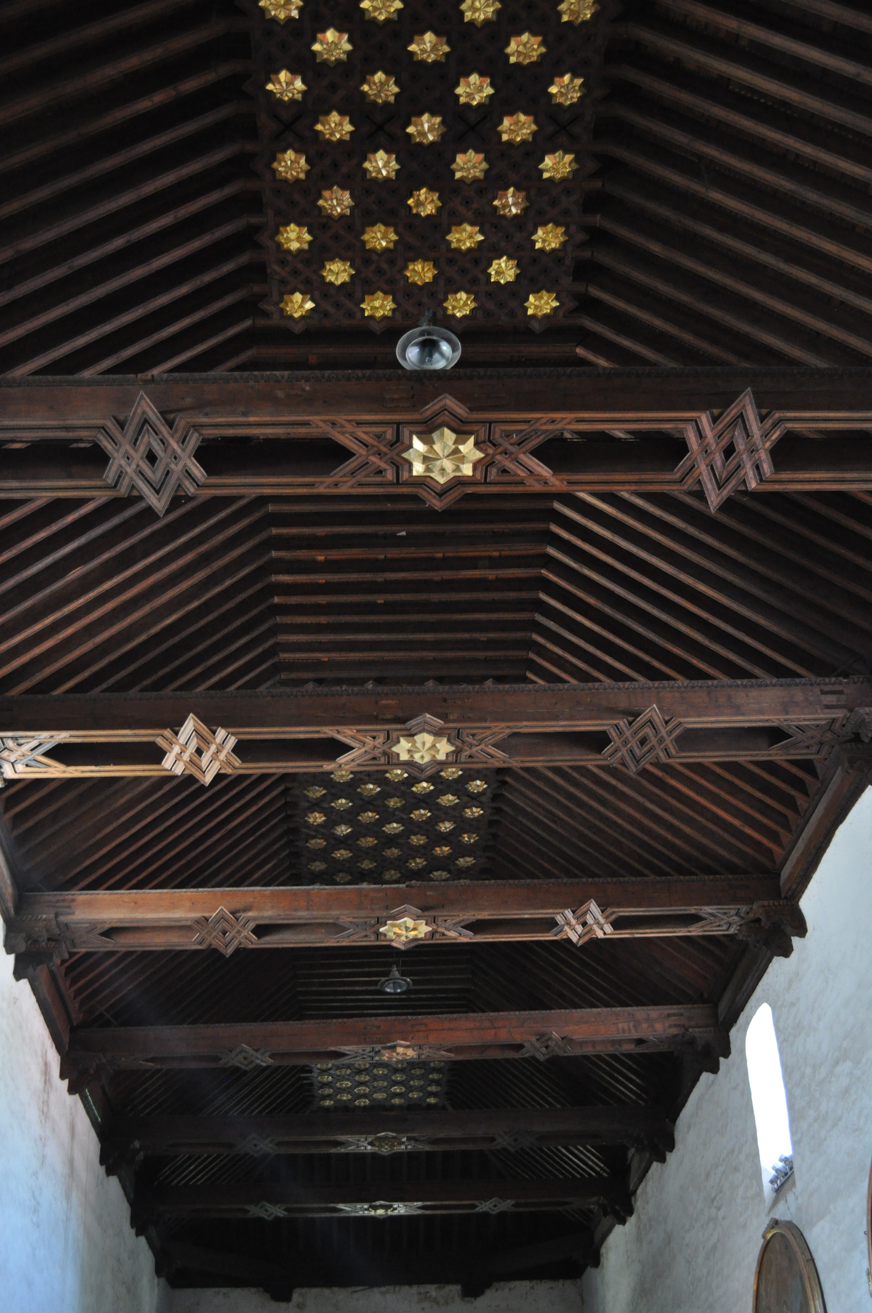 Templo y Ex Convento de San Francisco de la Asunción de Nuestra Señora